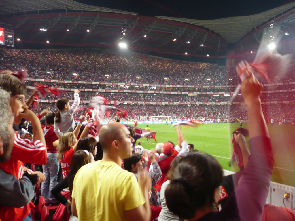 Luego del quinto gol (Saviola: Benfica 4 - Nacional 1) en el Estádio da Luz. Finalmente fueron 7 los goles válidos y dos los anulados (los dos de Benfica).